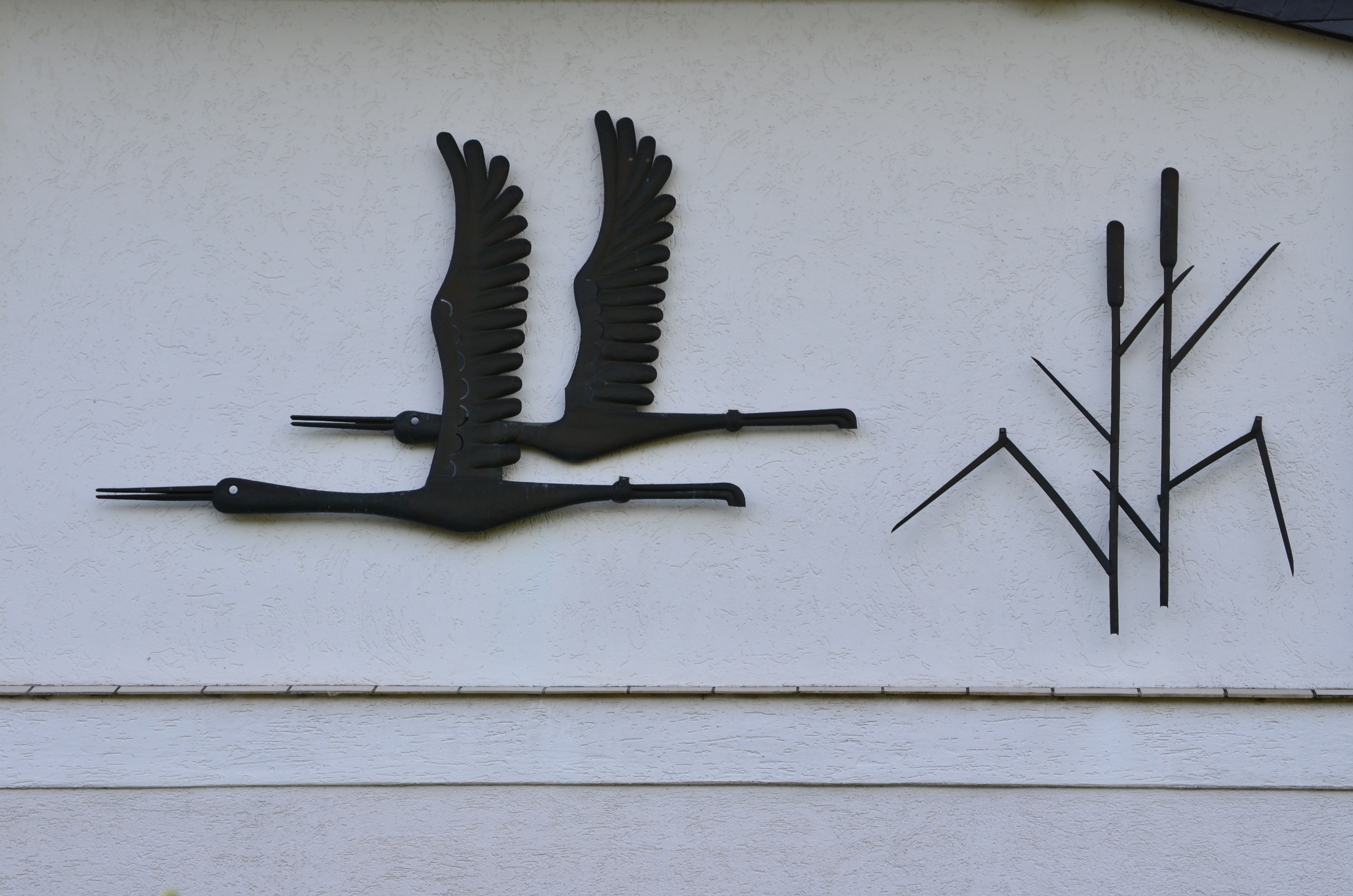 Fliegende Störche (Motiv Anfang der 1980er) von Klaus Rudolf Werhand